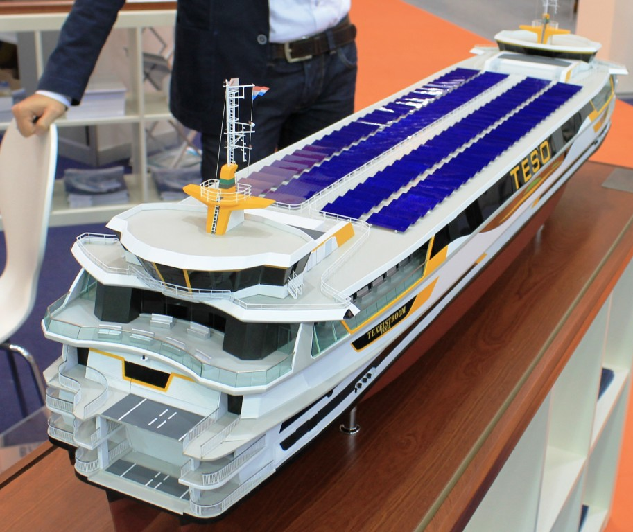 Modell der Texelstroom, Blick auf die Solarmodule